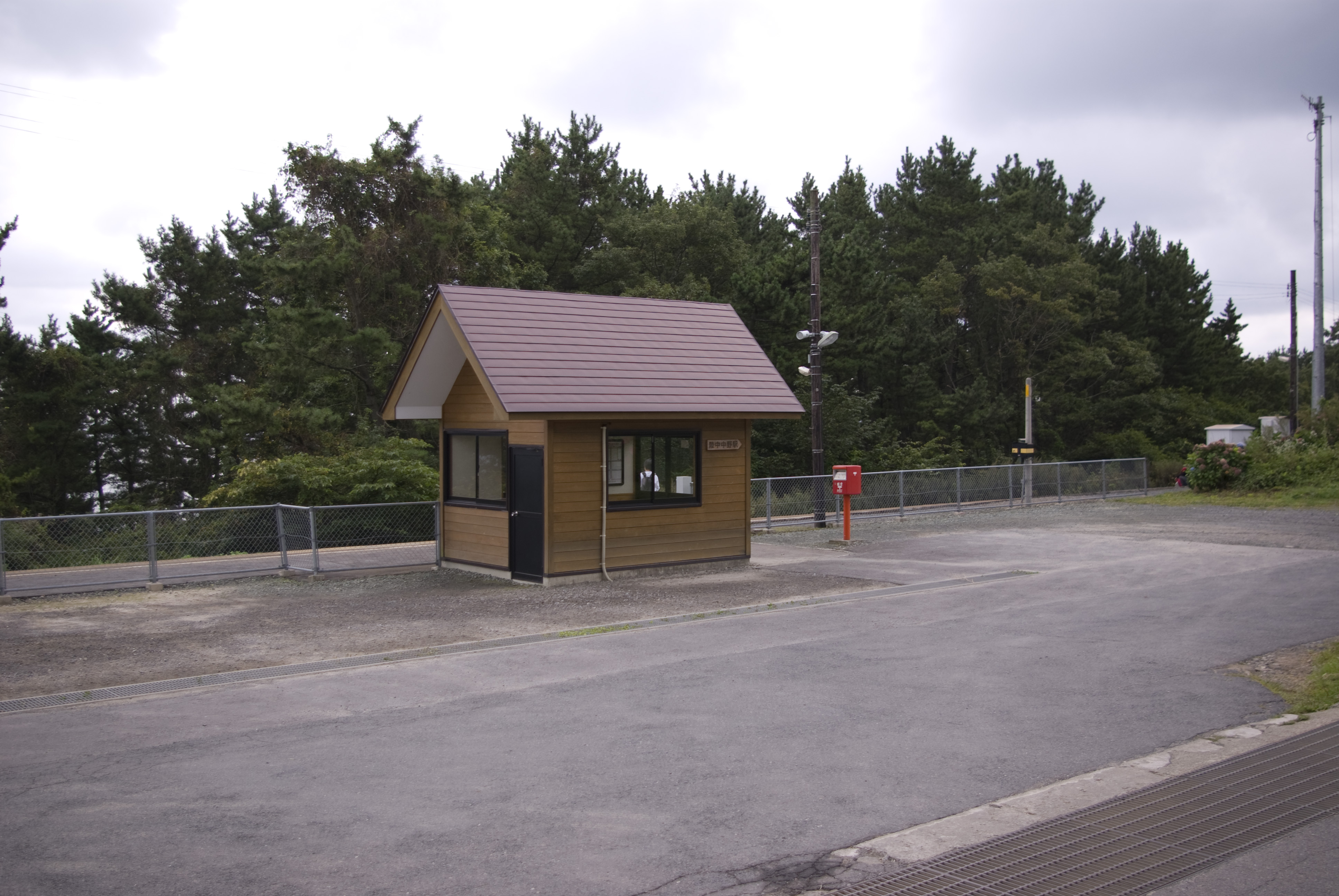 JR八戸線陸中中野駅